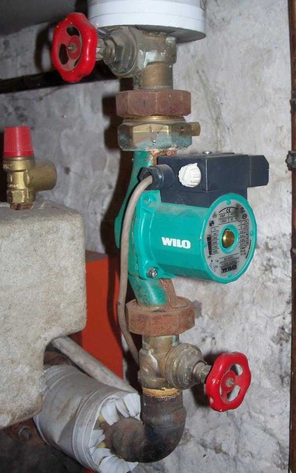 Ungeregelte Umwälzpumpe in einer Heizungsanlage